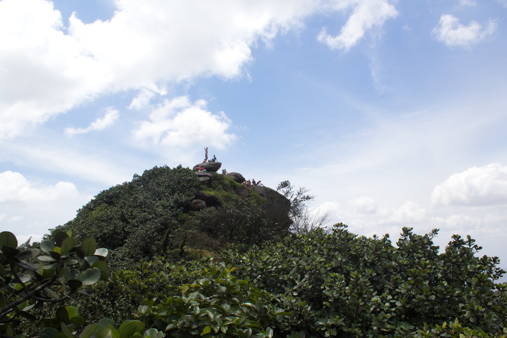 Vista da chegada à Pedra da Rajada em Maranguape - Ceará.